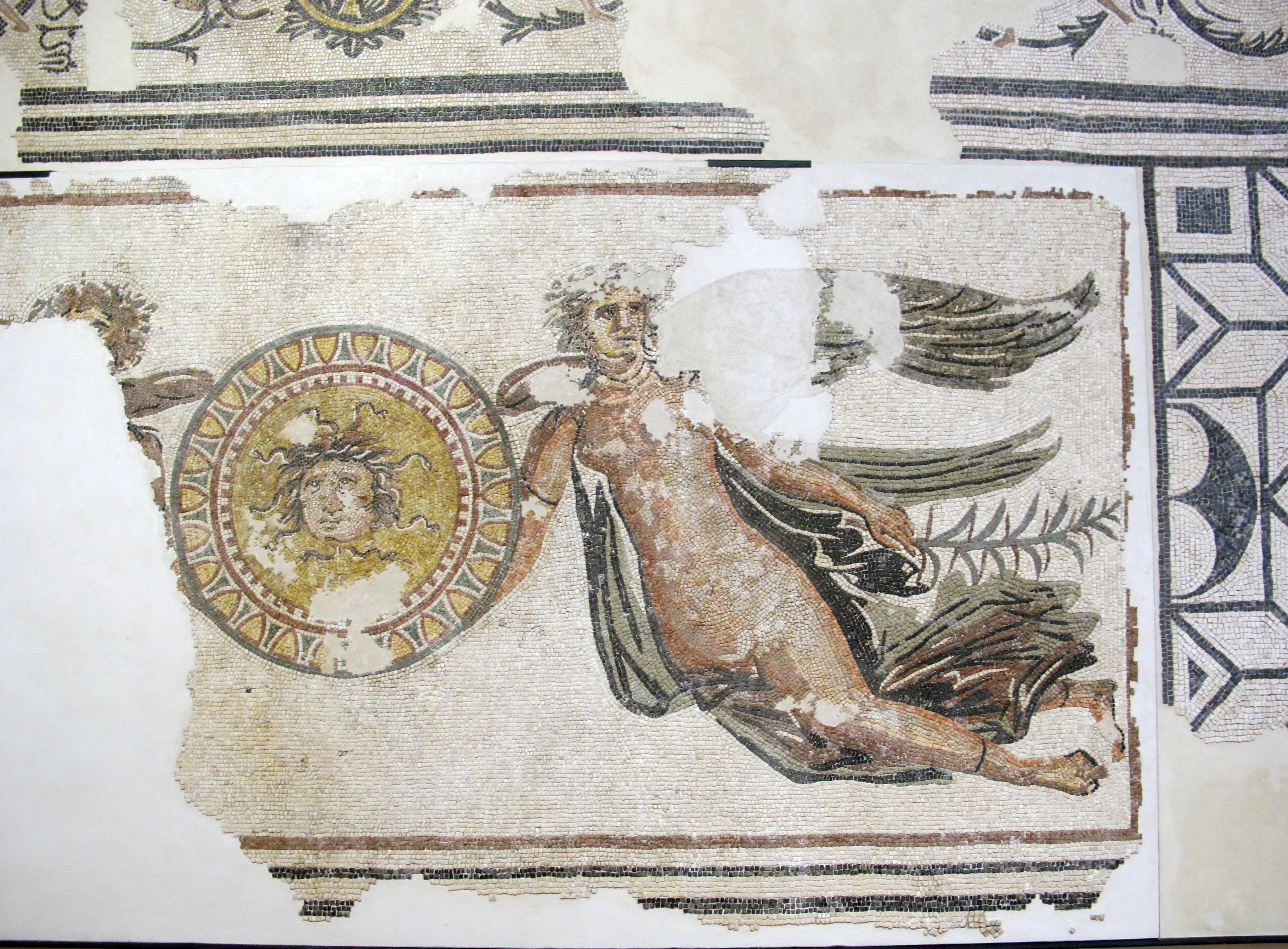 Rimini, mosaico tardoimperiale con vittorie alate e scudo con medusa